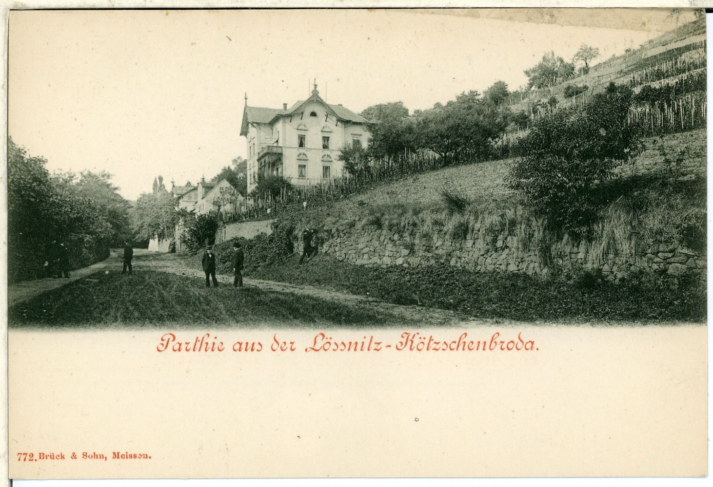 Kötzschenbroda; Lößnitzpartie This postcard is from publisher Brück & Sohn in Meißen ( postcard has a unique number 00772 and is available in a higher resolution at the publisher. This images was uploaded in a cooperation project between Wikipedians and the publisher.